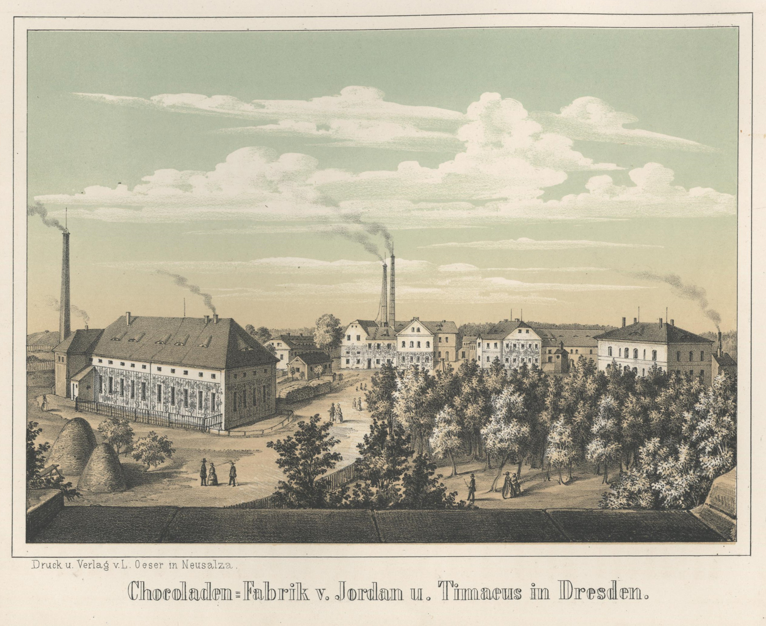 Chocoladen-Fabrik von Jordan und Timaeus in Dresden aus: Album der Sächsischen Industrie Erster Band